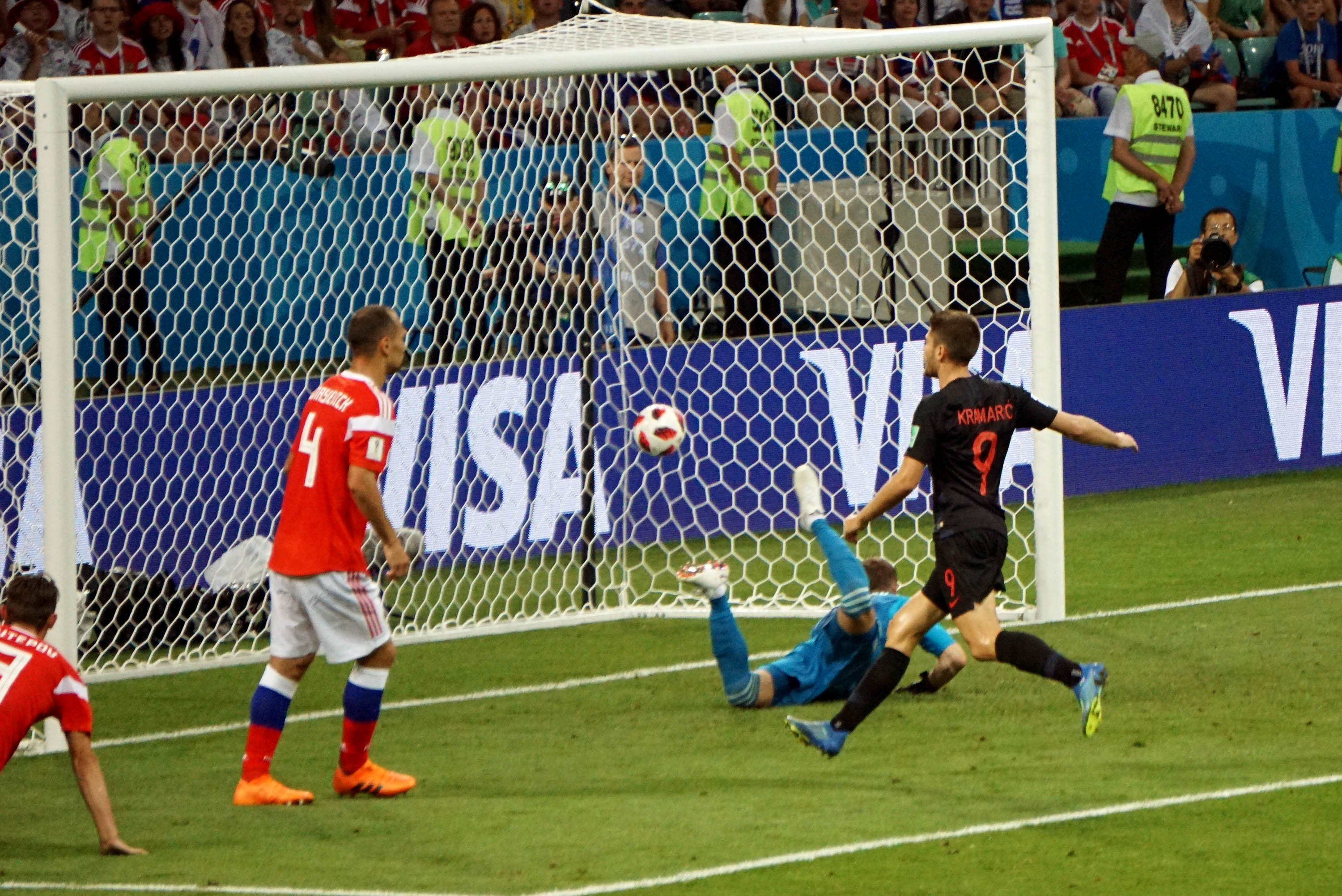 7 июля 2018 года сборная Хорватии обыграла сборную России со счётом 2:2 (4:3) по пенальти на ЧМ-2018 на стадионе «Фишт». На 40-й минуте Андрей Крамарич сравнял счёт, а ассистировал ему Марио Манджукич.